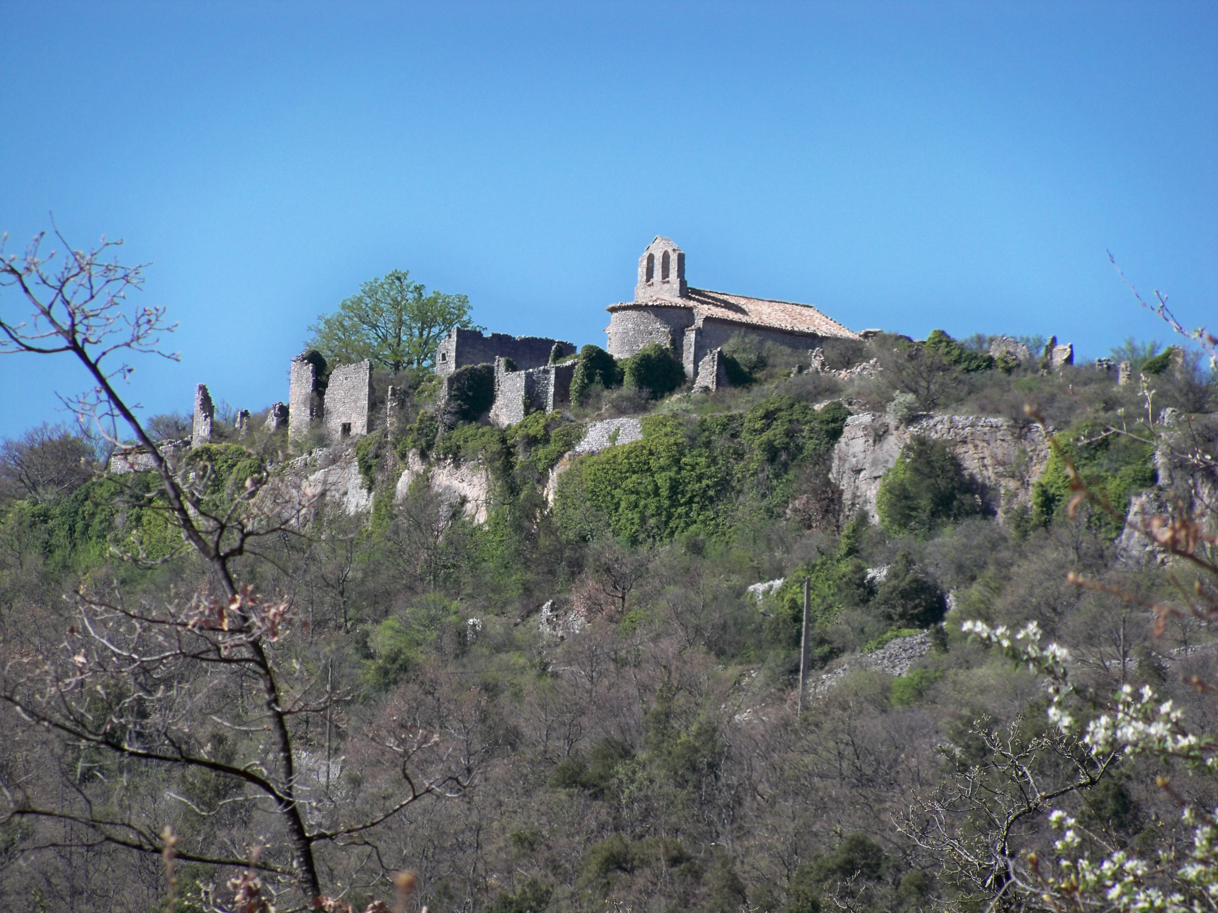 Hameau abanonné de Montsalier le Vieux (04)